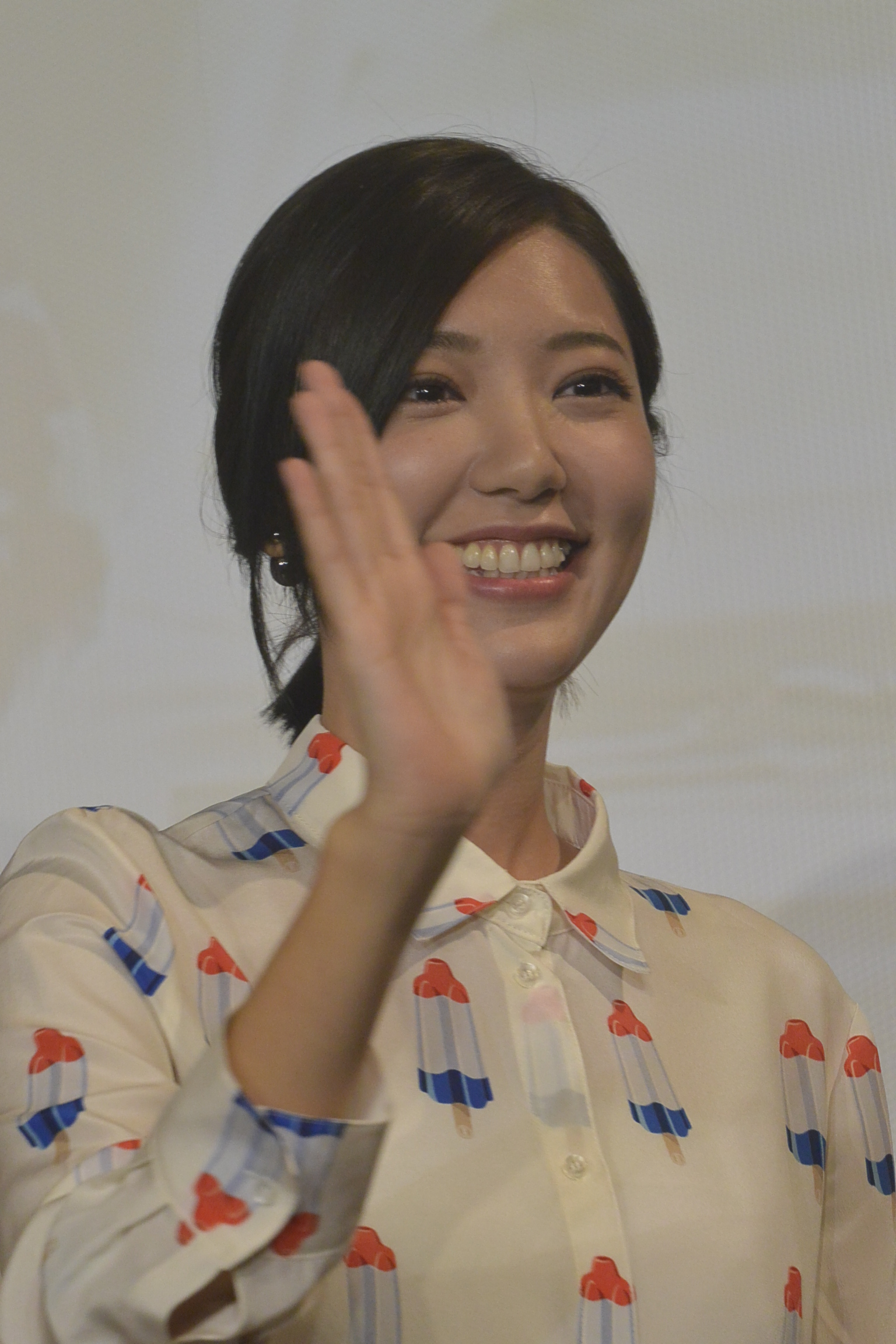 喜歡．一個人《最終回》粉絲見面會